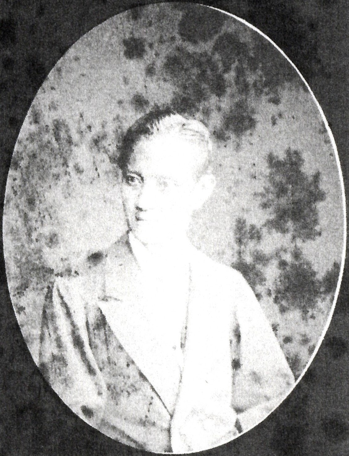 松平頼策の肖像写真。